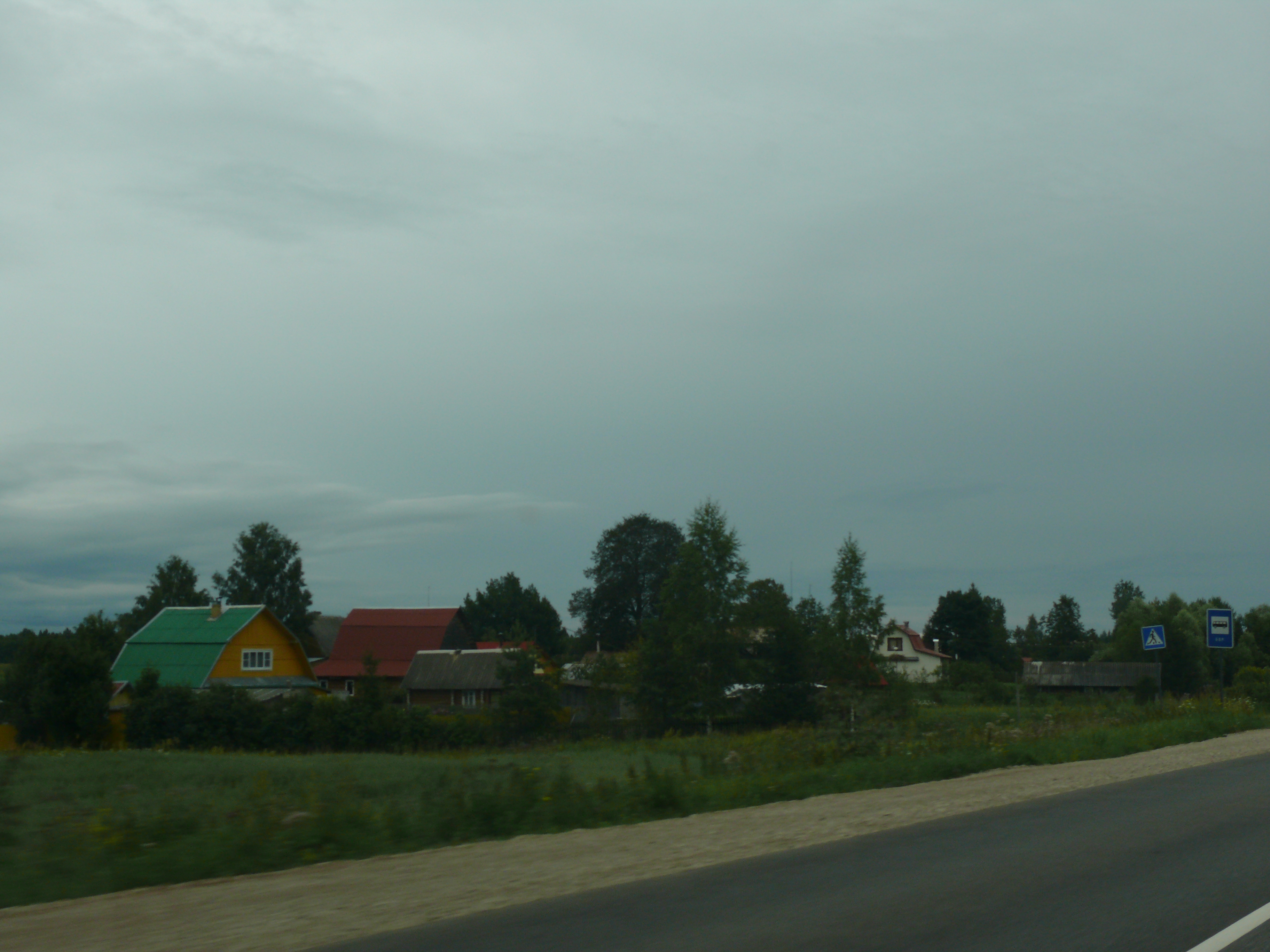 Деревня Бор Батецкого района Новгородской области